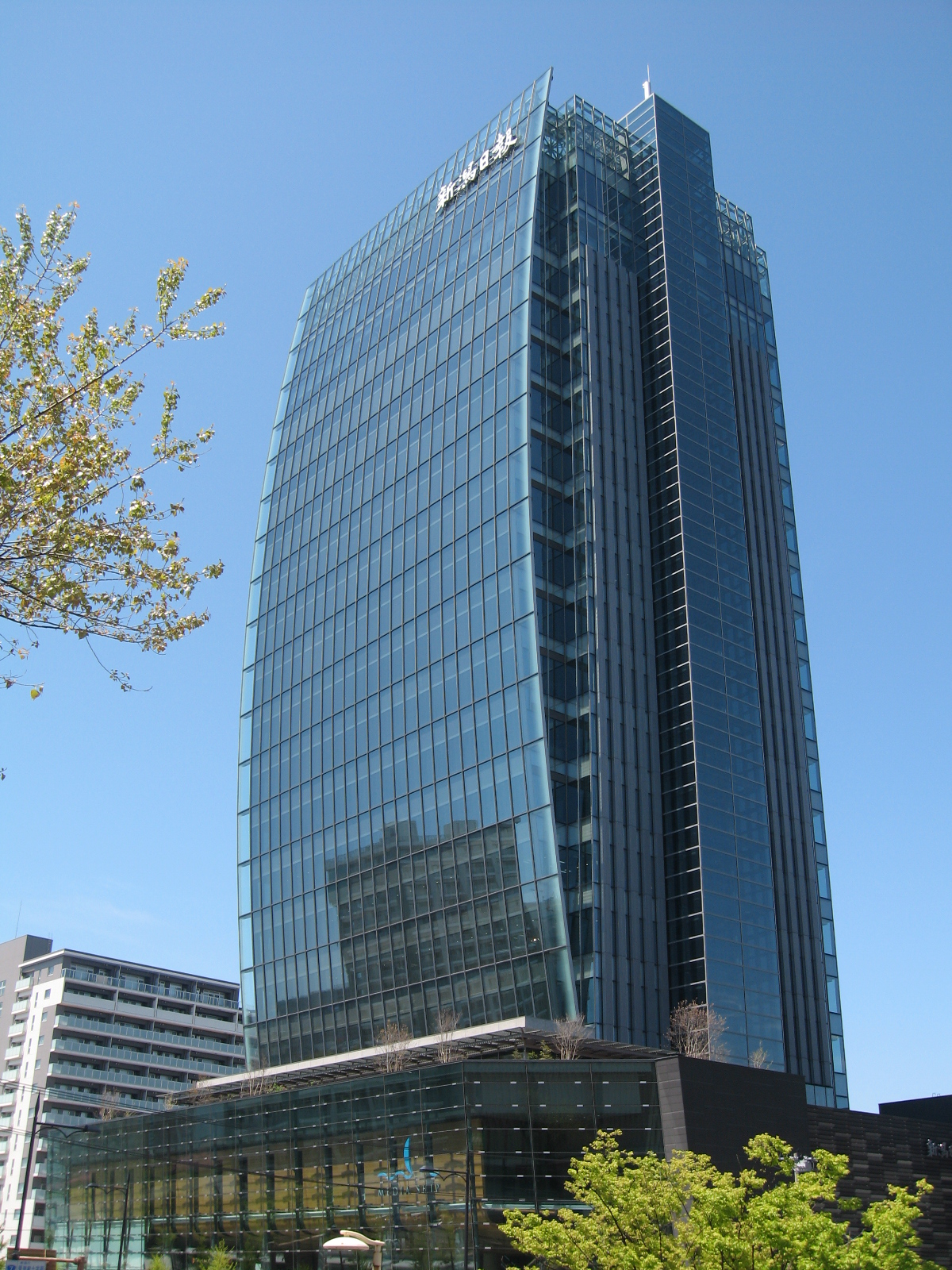 新潟県新潟市中央区。2013年4月12日に開業した新潟日報社の新社屋、メディアシップの画像。